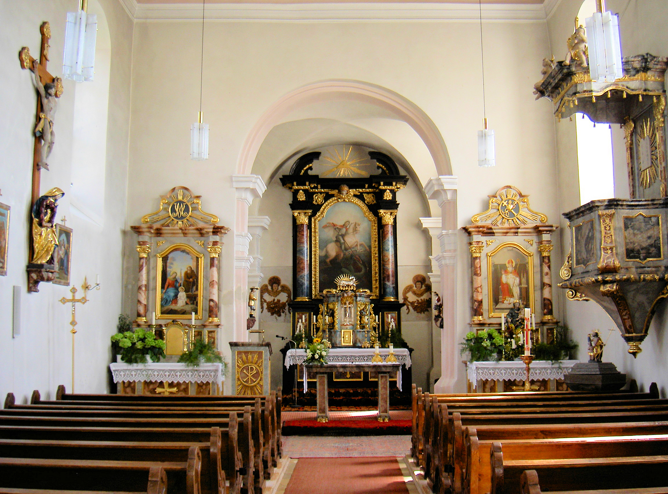 Etzgersrieth Kirche innen